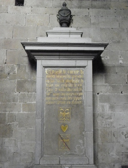 Monument du cœur de Bertrand du Guesclin en la basilique Saint-Sauveur de Dinan (22).